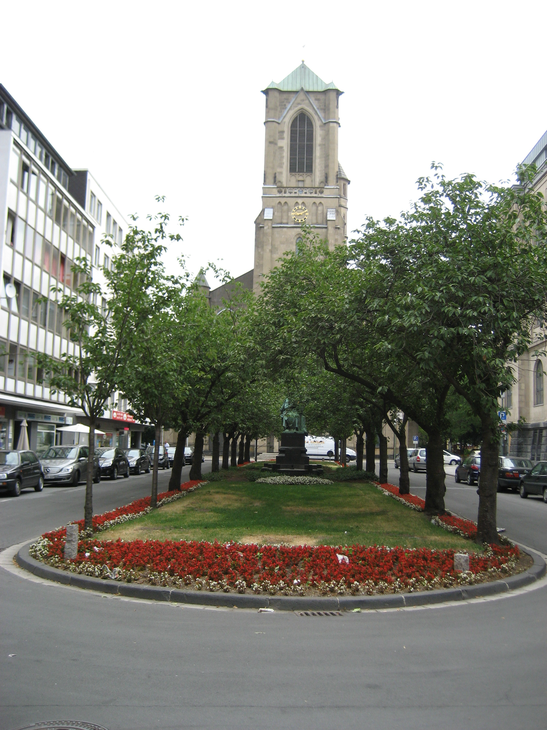 Neuss. Situation vor der Kirche St. Marien.